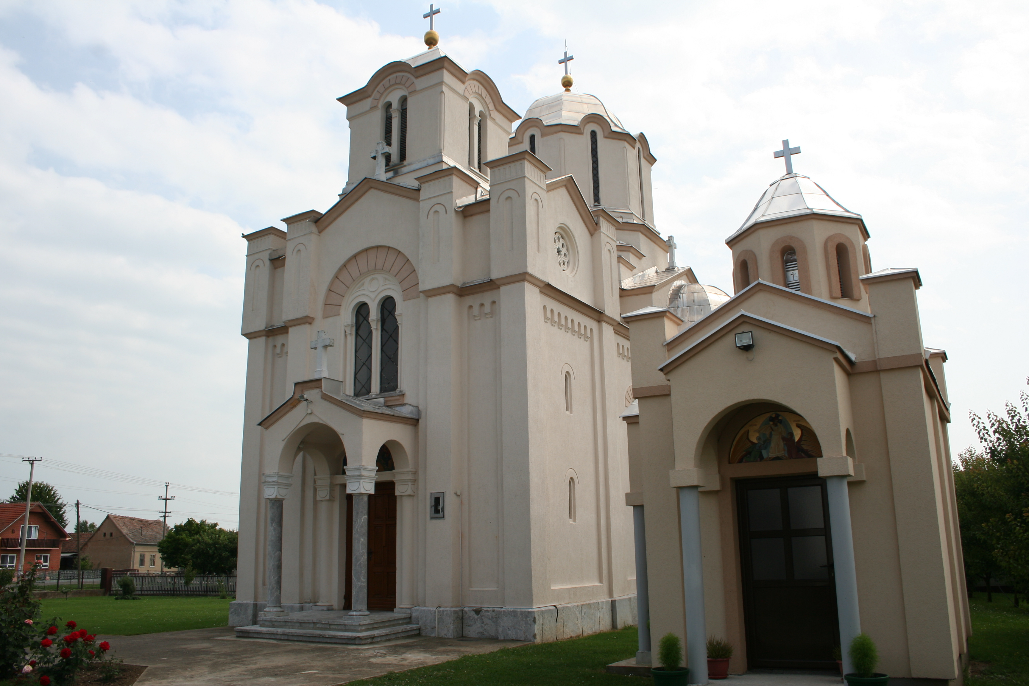 Crkva Svete Trojice u Zasavici II